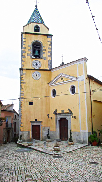 La Chiesa del Carmine nell'omonima piazza a San Marco dei Cavoti (BN), Italia